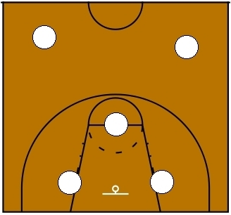 Basketball Zone Defense